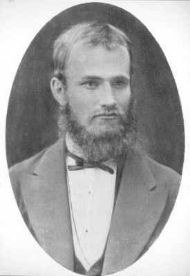 Jan Niecisław Baudouin de Courtenay